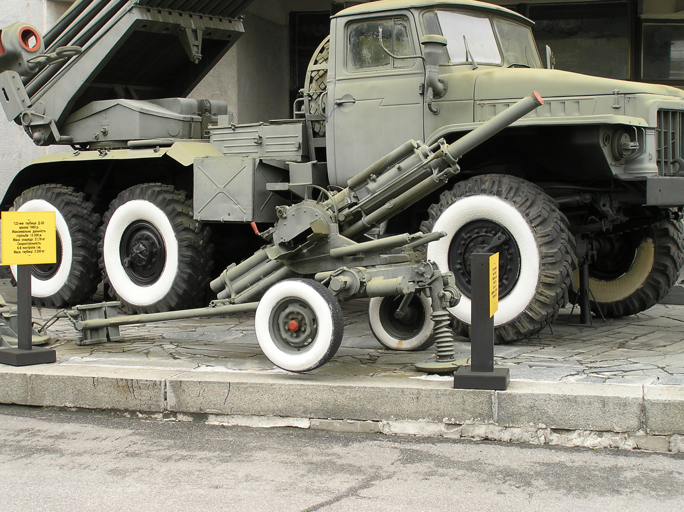 Миномет Василек (Vasilek Mortar)